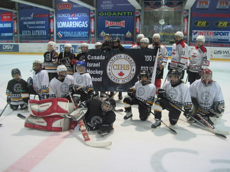 מכבי צעירי מטולה (CIHS) - משלחת 2012 פינלנד